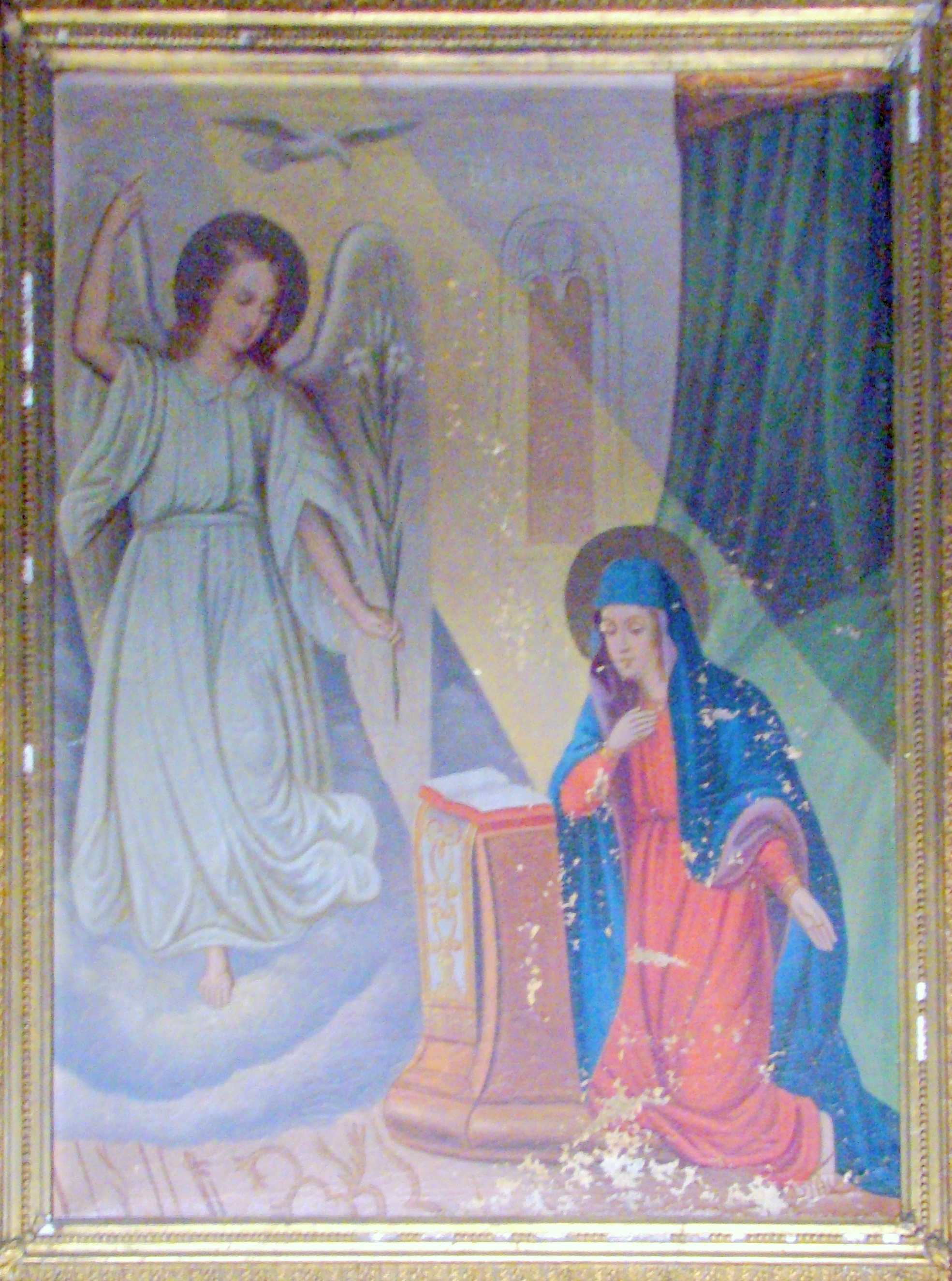 Biserica de lemn „Buna Vestire” din Belejeni, județul Bihor